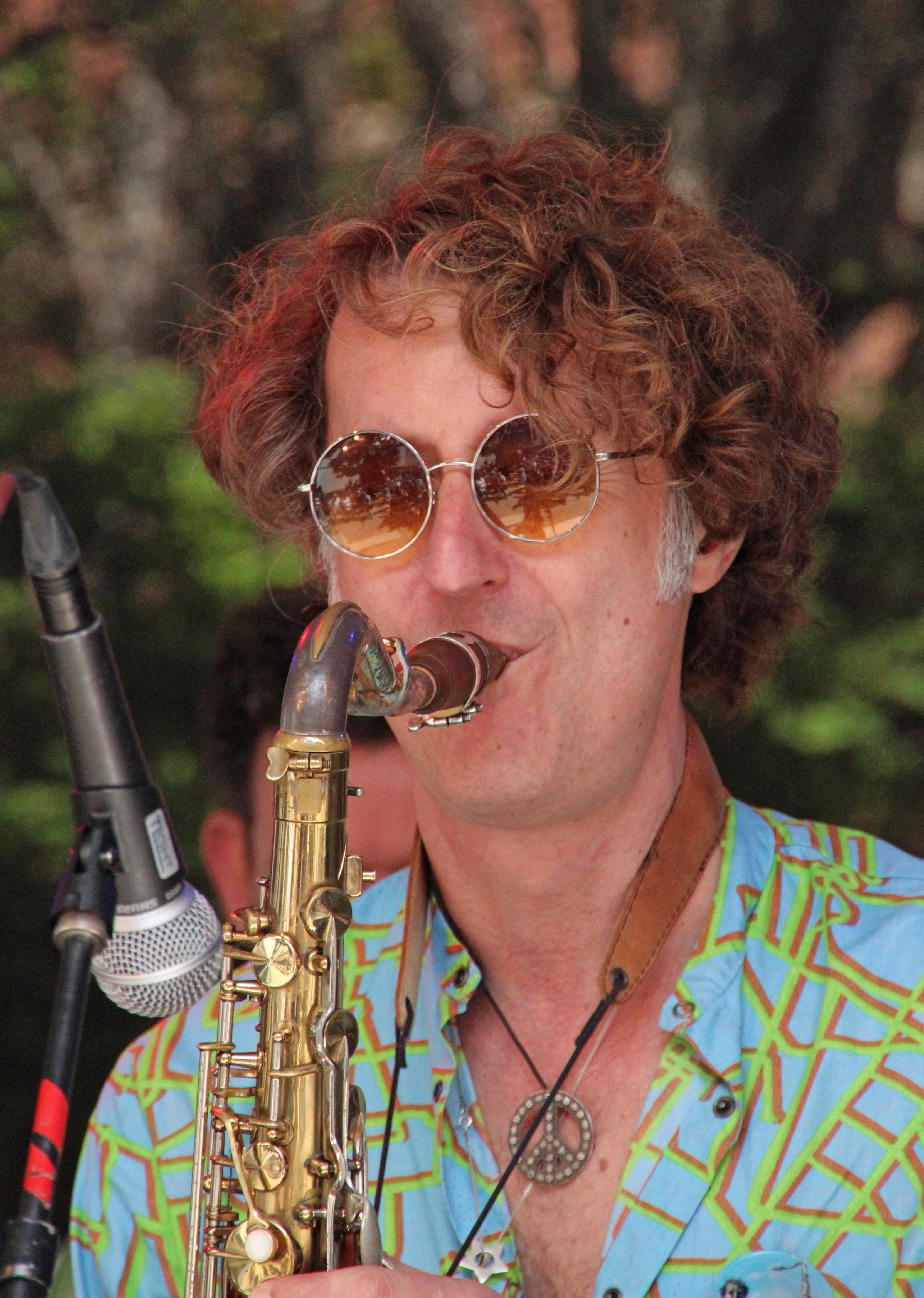 Bildinhalt: Stephan-Max Wirth bei den 22. Jazztagen Idar-Oberstein 2017. Aufnahmeort: Idar-Oberstein, Deutschland Die dargestellte Person wurde bei einem öffentlichen Auftritt fotografiert.